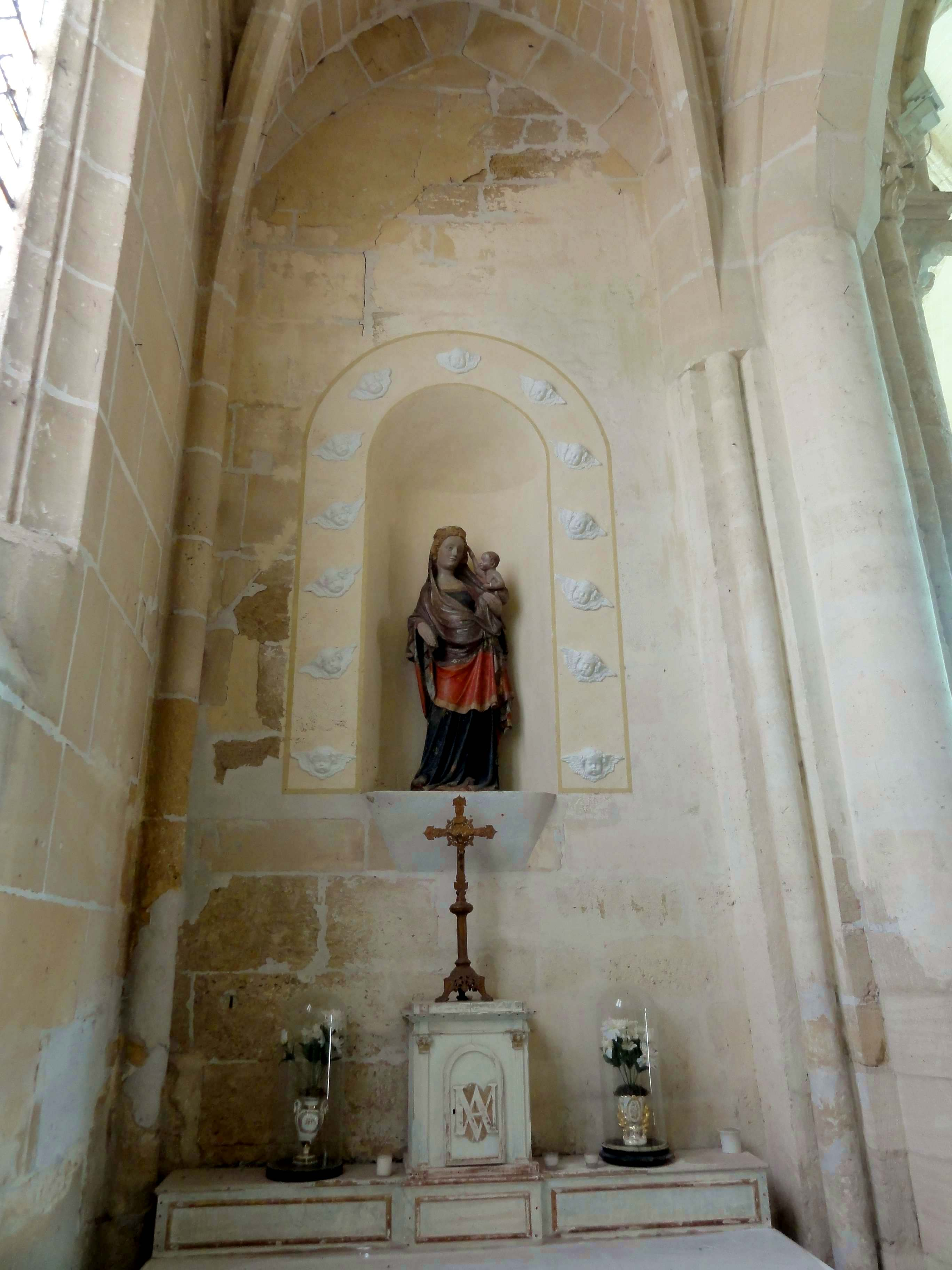 Intérieur de l'église (voir titre).